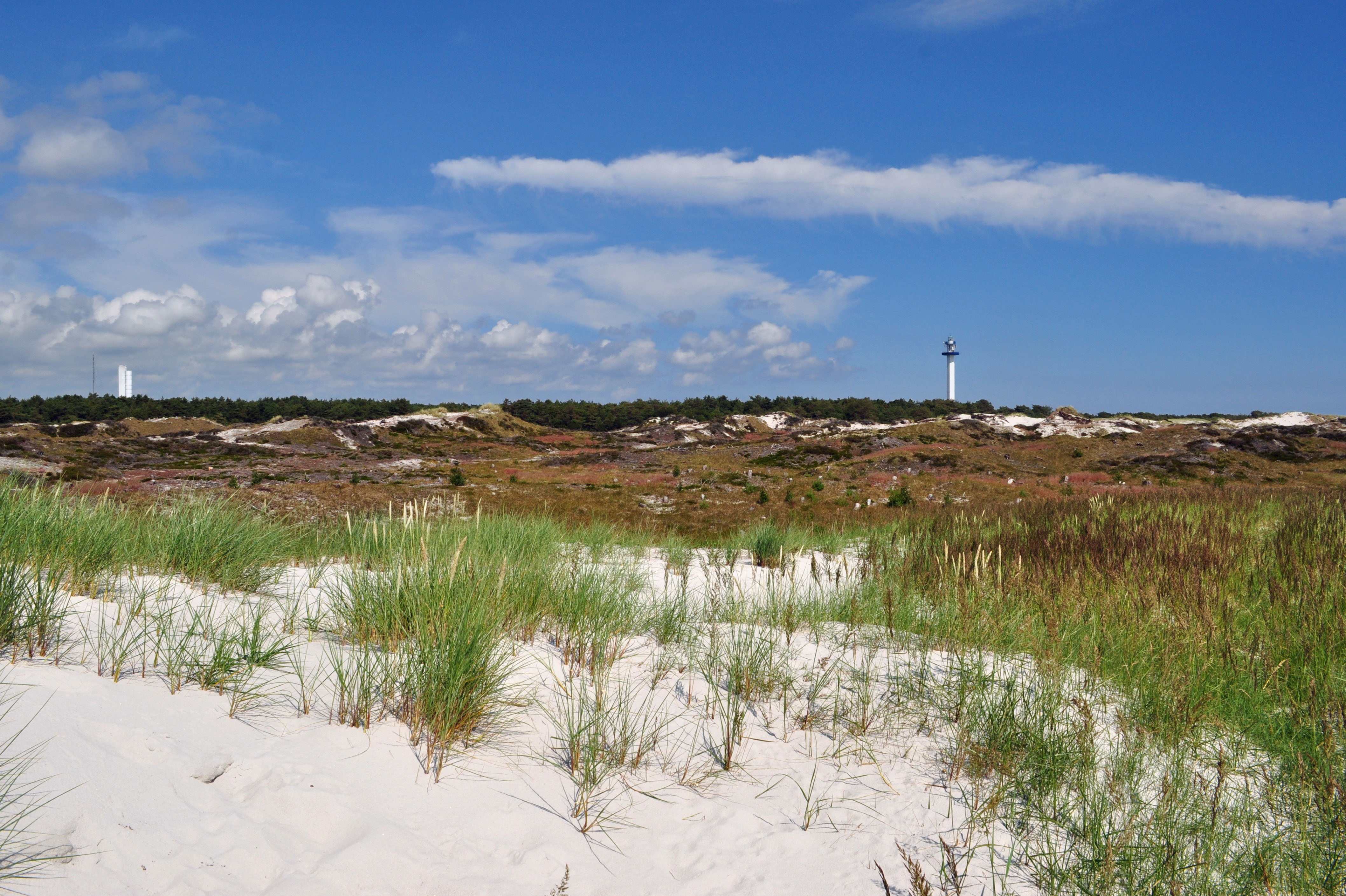 Dueodde, Bornholm (2012-07-09), by Klugschnacker in Wikipedia (3)